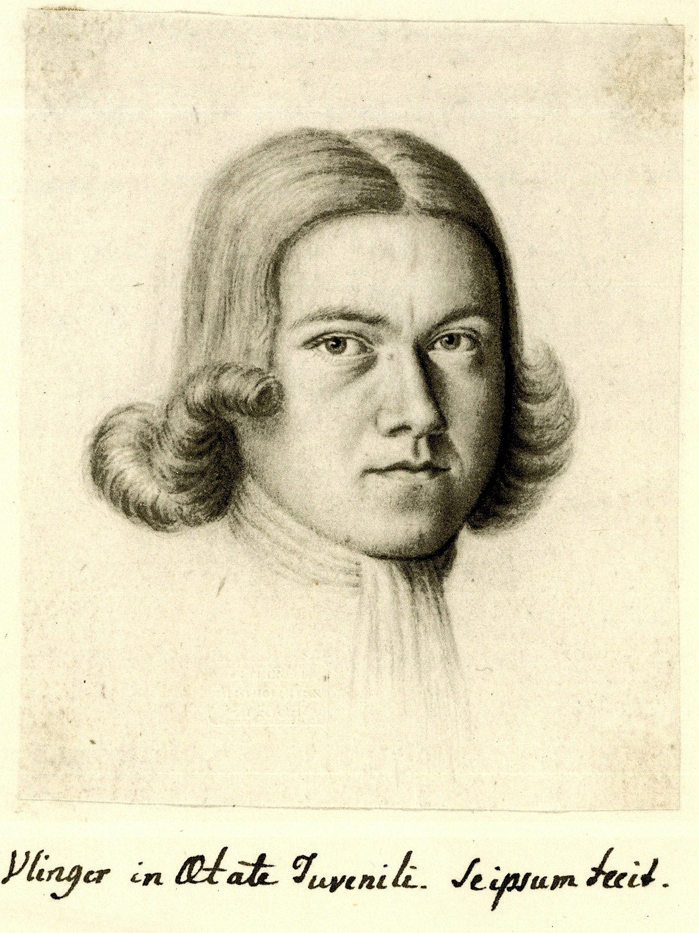 Johann Caspar Ulinger Selbstportrait 1732